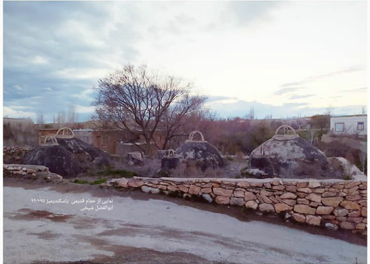 این حمام در شهر حسن آباد یاسوکند واقع شده که مربوط به دوره ایلخانی می باشد